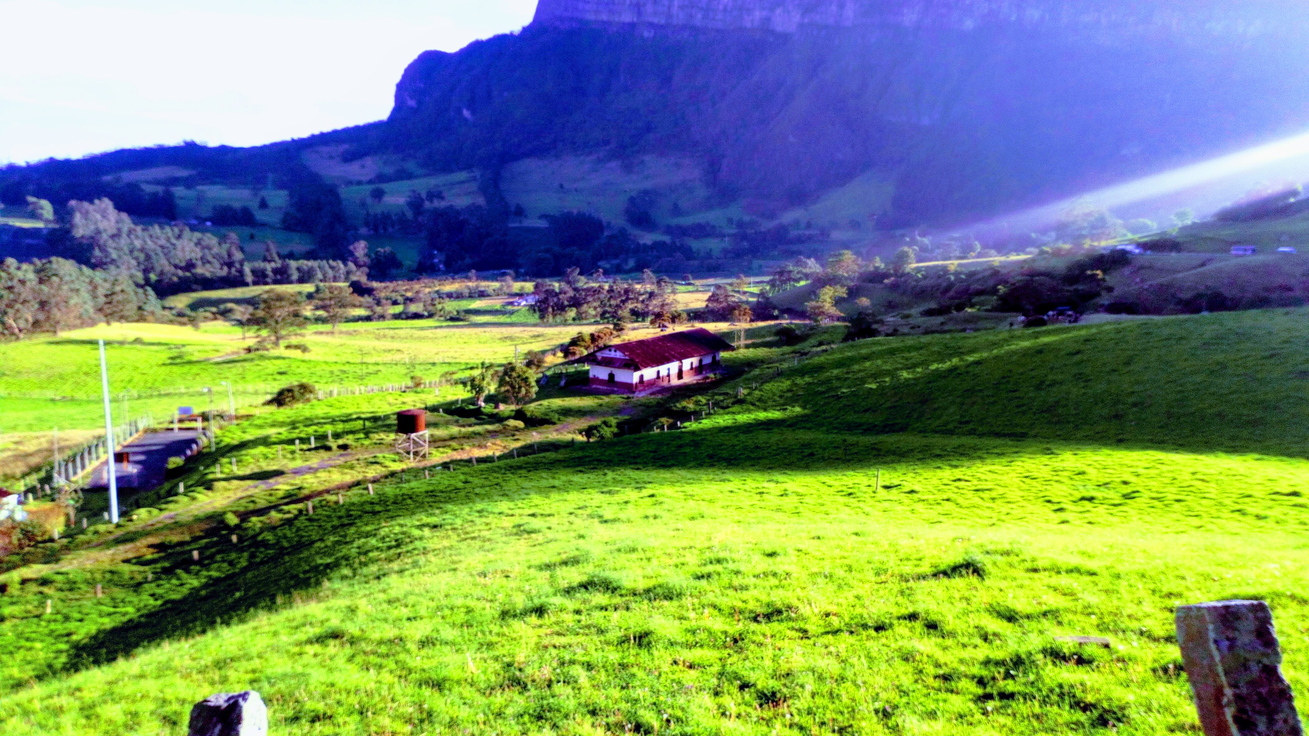 estacion de los alpes a la altura de la via Bogotá Medellin